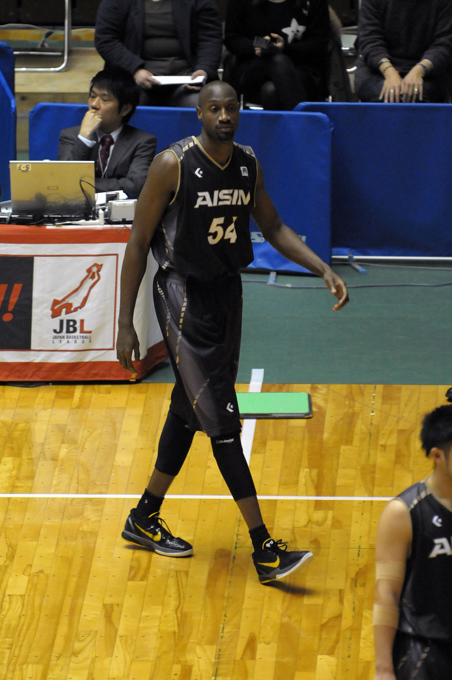 アイシンシーホース、アンソニー・リチャードソン選手。秋田県立体育館で。